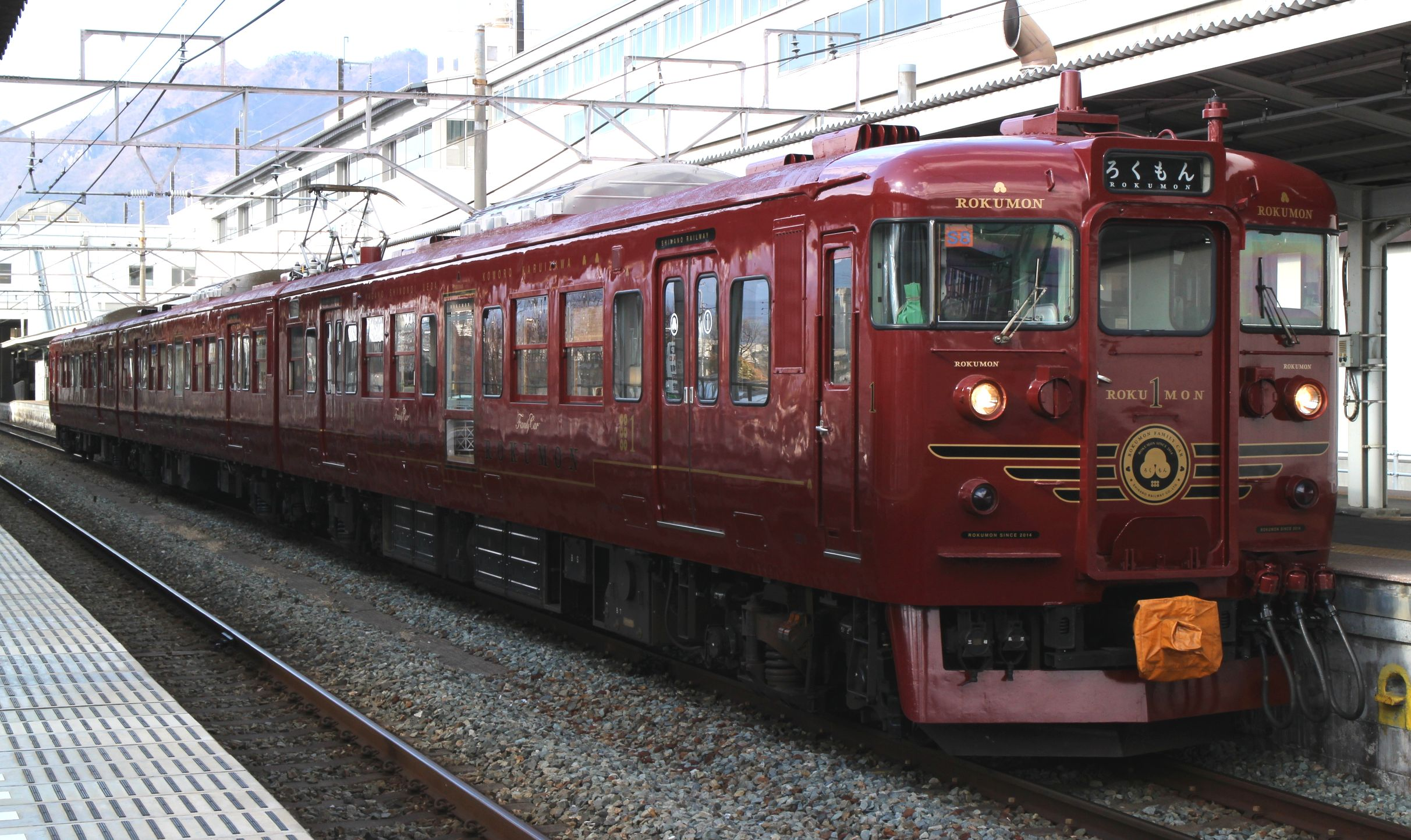 しなの鉄道115系S8編成「ろくもん」